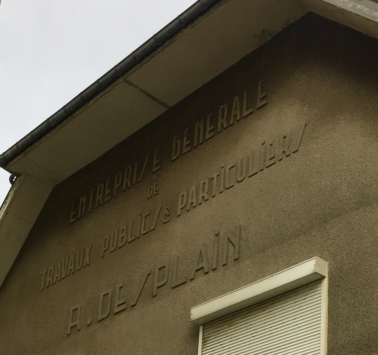 Cette inscription figure sur le mur de l'ex-entreprise R. Desplain sise au 49, rue de la Paix à Le Touquet-Paris-Plage